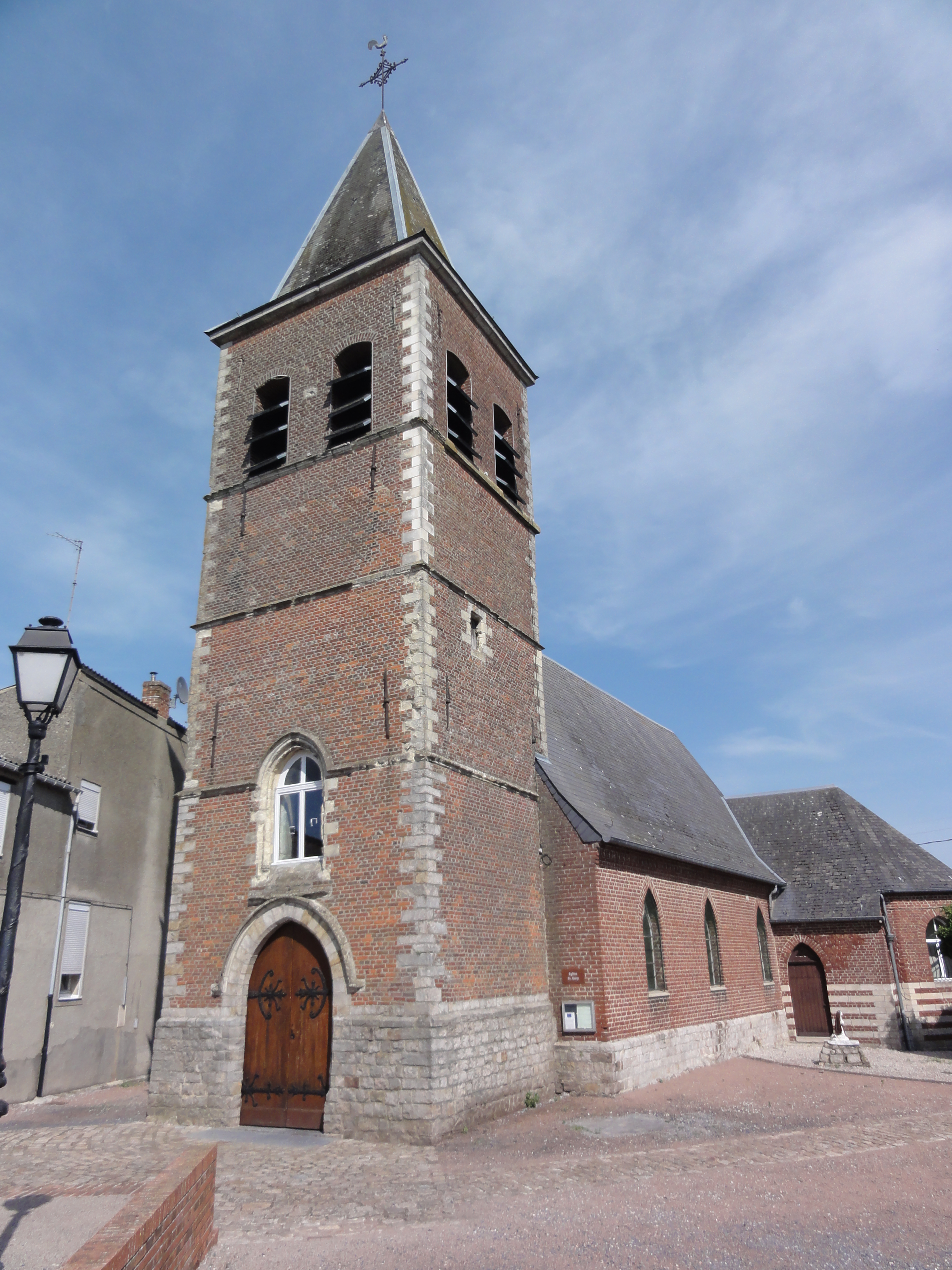 Frasnoy (Nord, Fr) église, coté tour